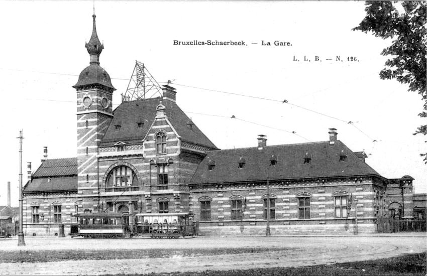 Photo ancienne de la gare de Schaerbeek